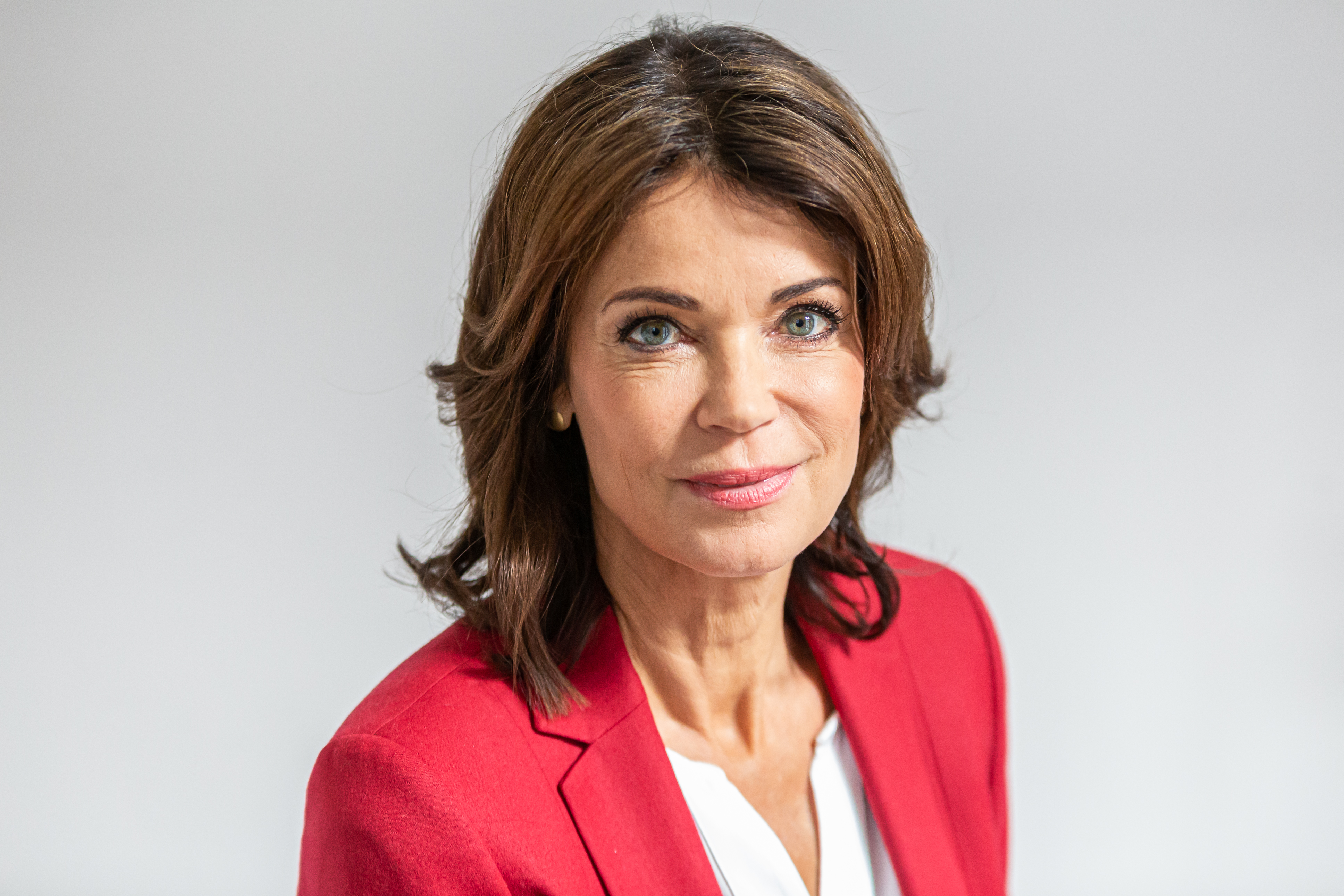 TV, ARD, Cast "Rote Rosen" Staffel 16; Gerit Kling